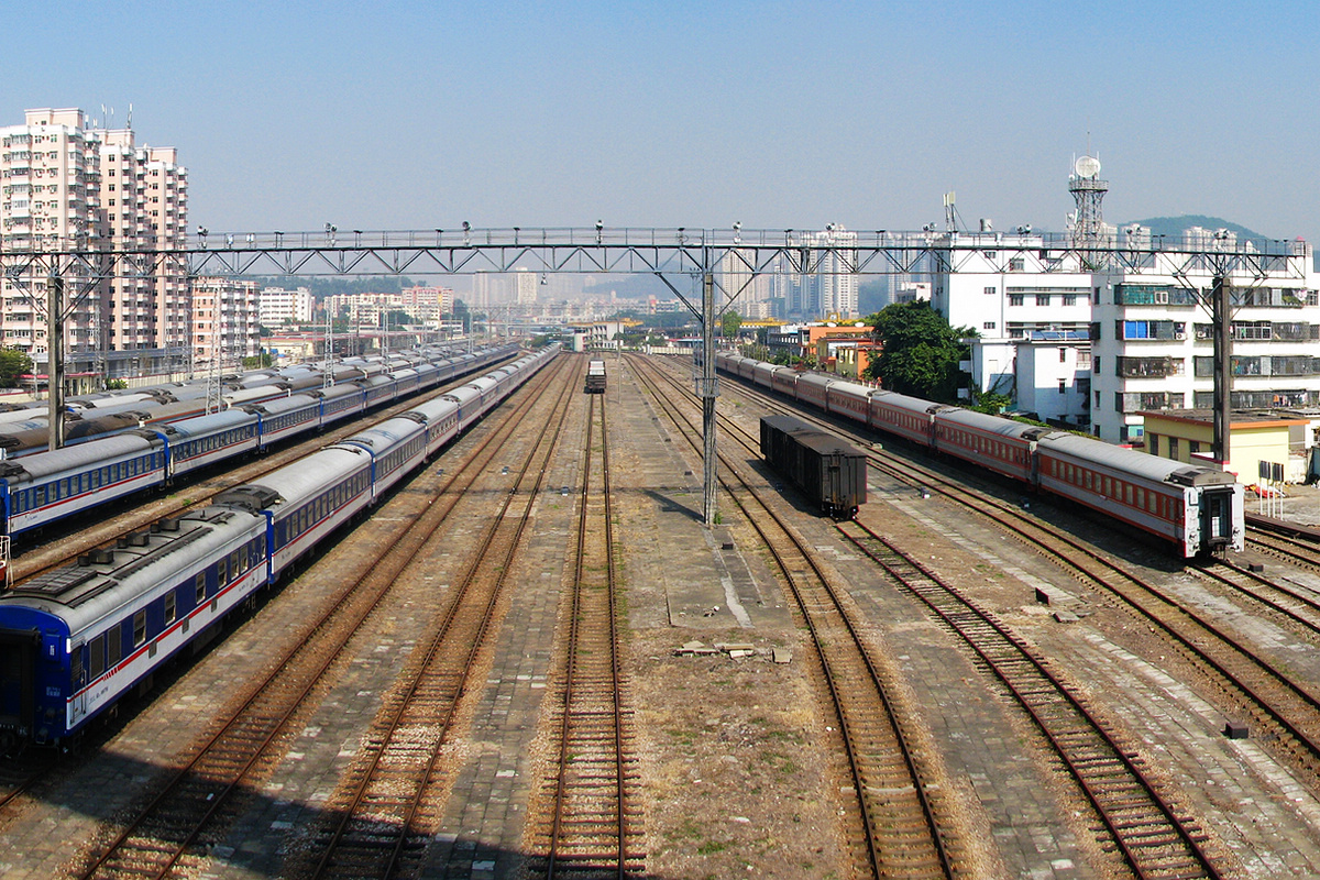 深圳笋岗站